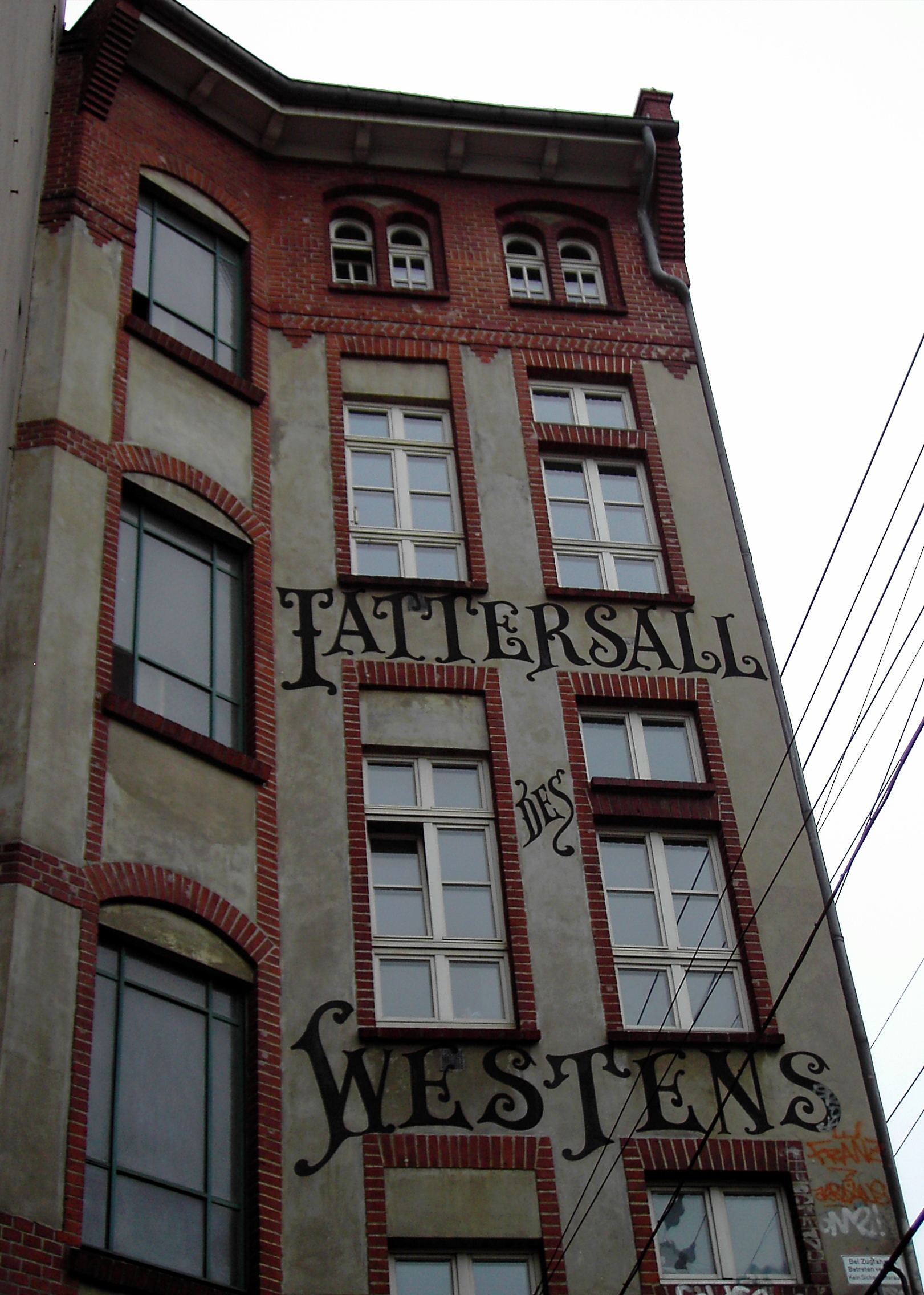 Berlin - Uhlandstraße Richtung Savignyplatz: Tattersallschriftzug